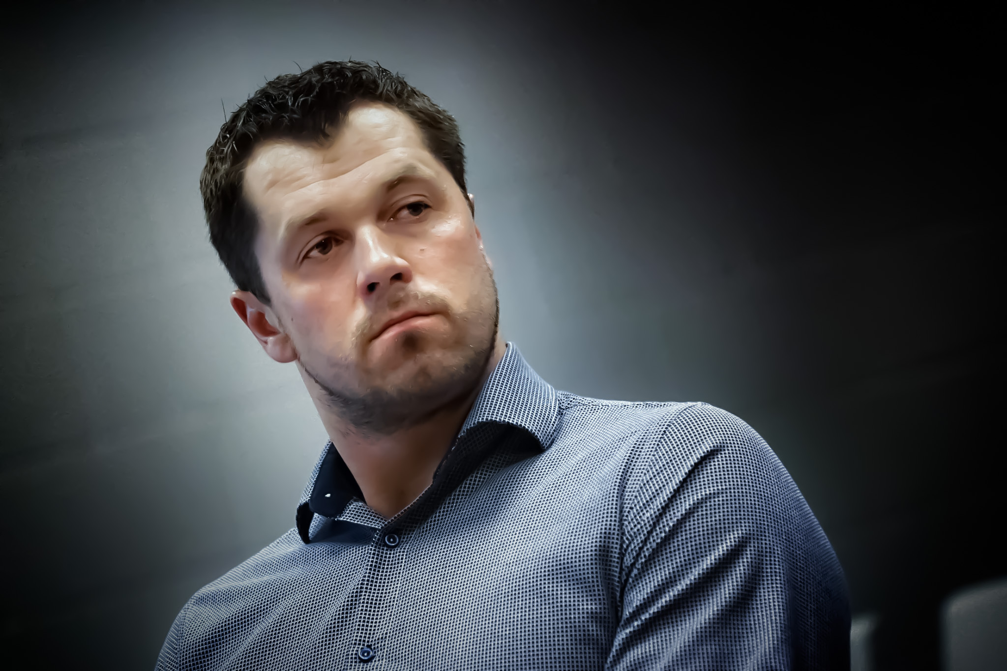 Gundars Celitāns ir viens no visu laiku sekmīgākajiem latviešu volejbolistiem, kas aizvadījis spilgtu profesionāļa karjeru. Spēlē diagonāles uzbrucēja pozīcijā Latvijas un ārvalstu klubos, noslēdzošajās karjeras sezonās pārstāvot Dienvidkorejas klubu. Celitāns ārpus Latvijas sāka spēlēt kopš 2007/2008.gada sezonas, kad ieguva līgumu Francijas volejbola sistēmā.